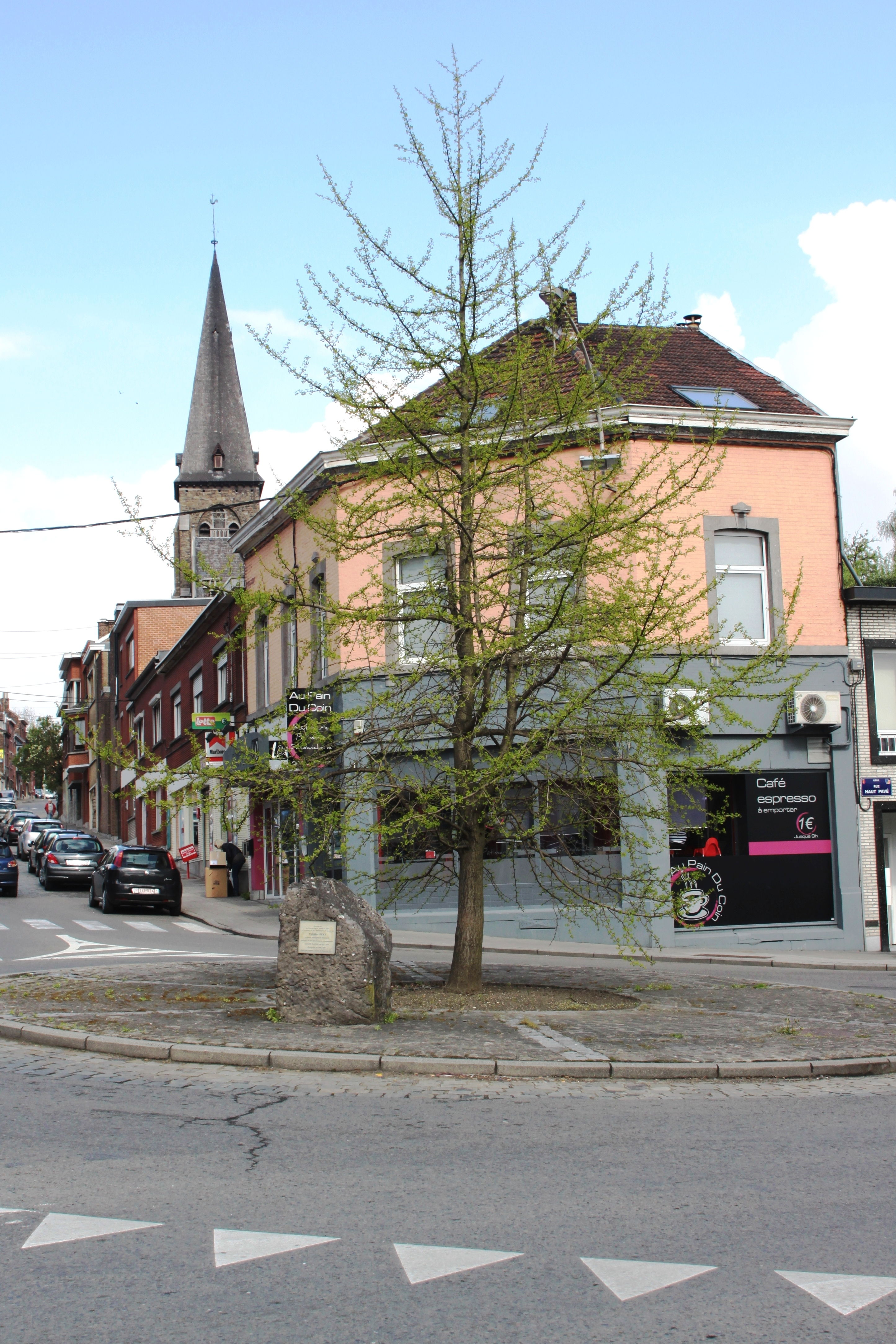 Stèle Walthère Dewé um Tier à Liège mam Bam, vun 1994